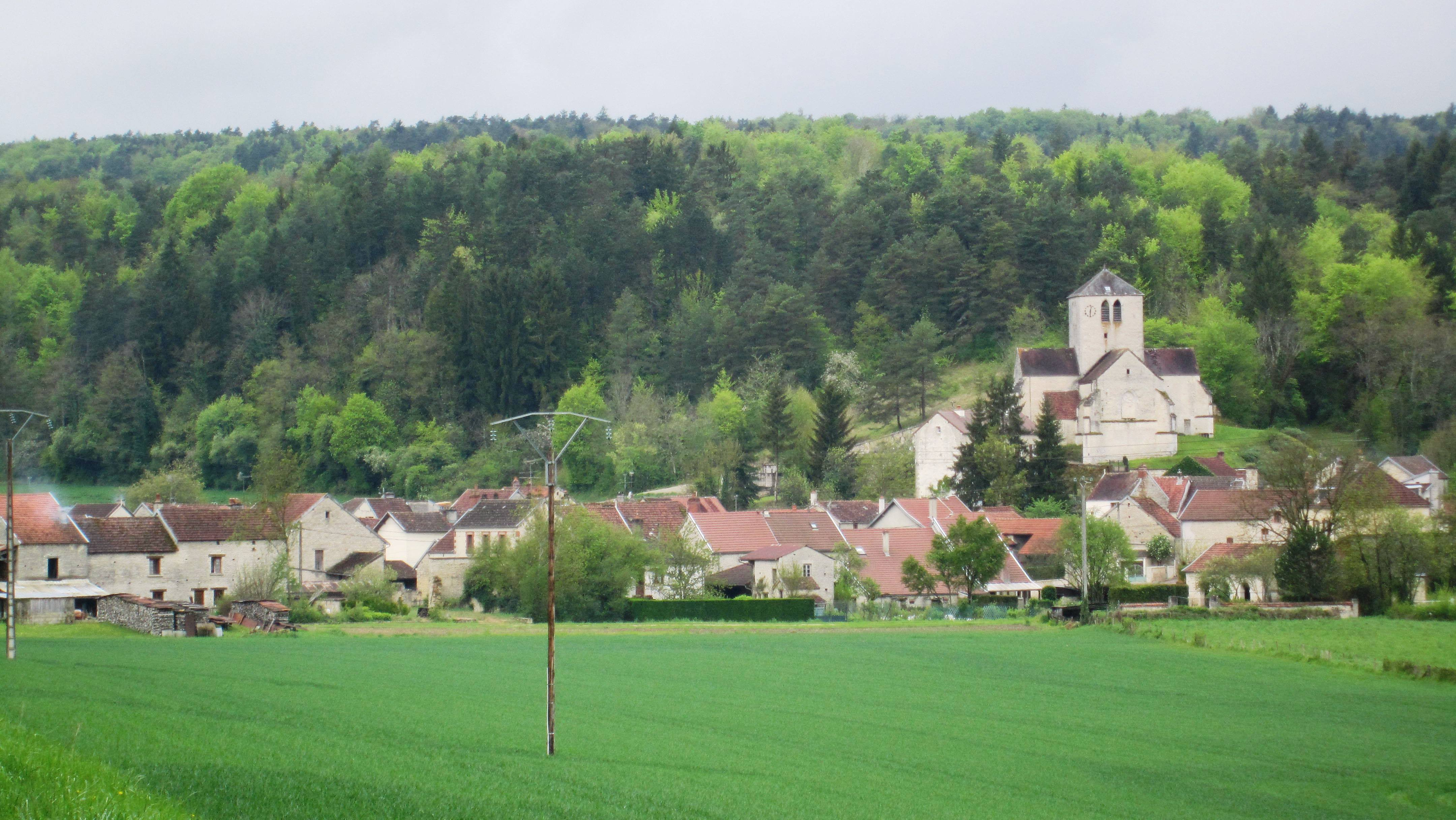 Noiron-sur-Seine (Côte-d'Or)